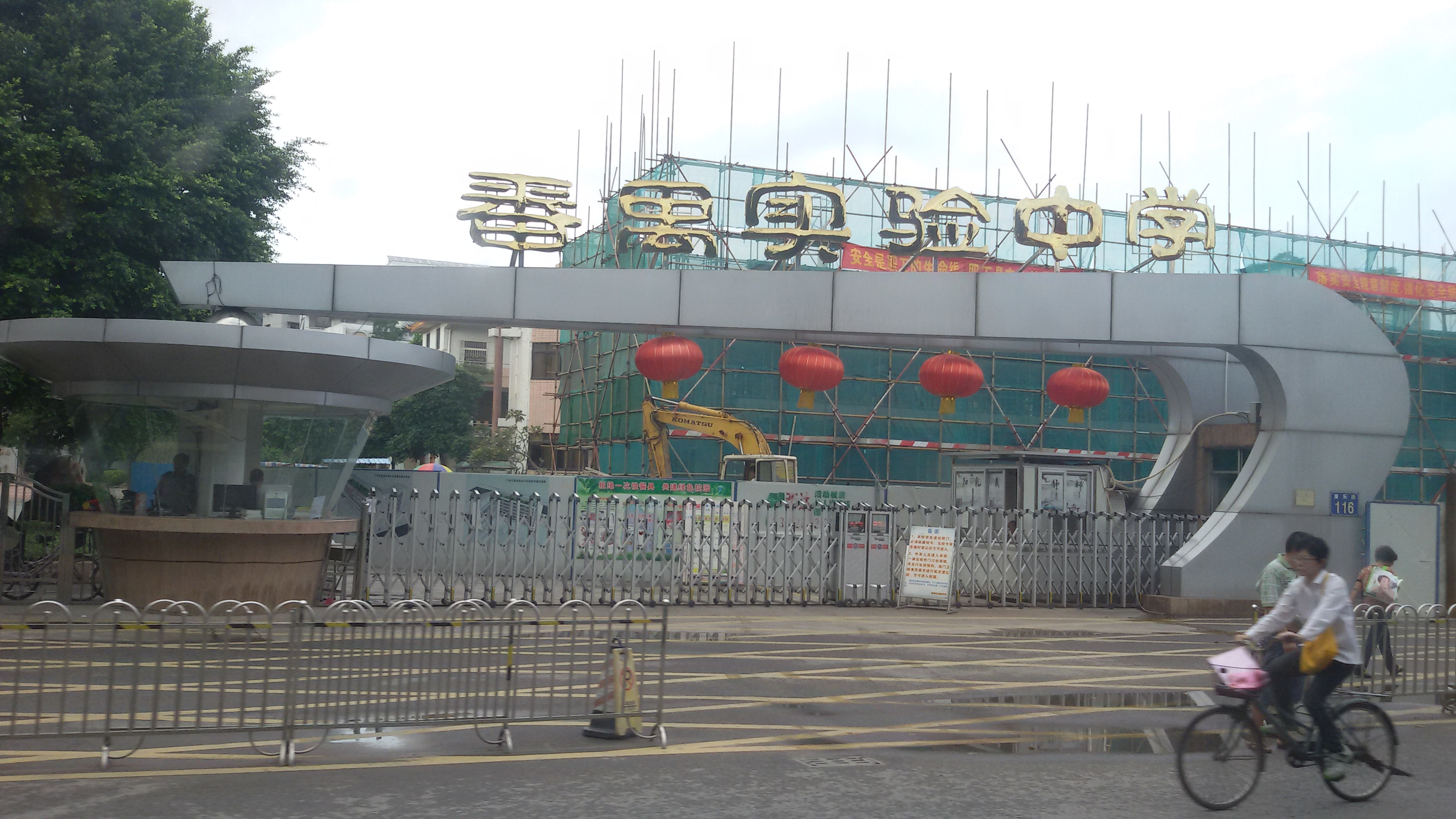 粵語: 番禺實驗中學